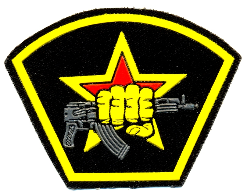 Знак Спецназа Внутренних войск МВД РФ - Кулак с автоматом "Боевая единица"